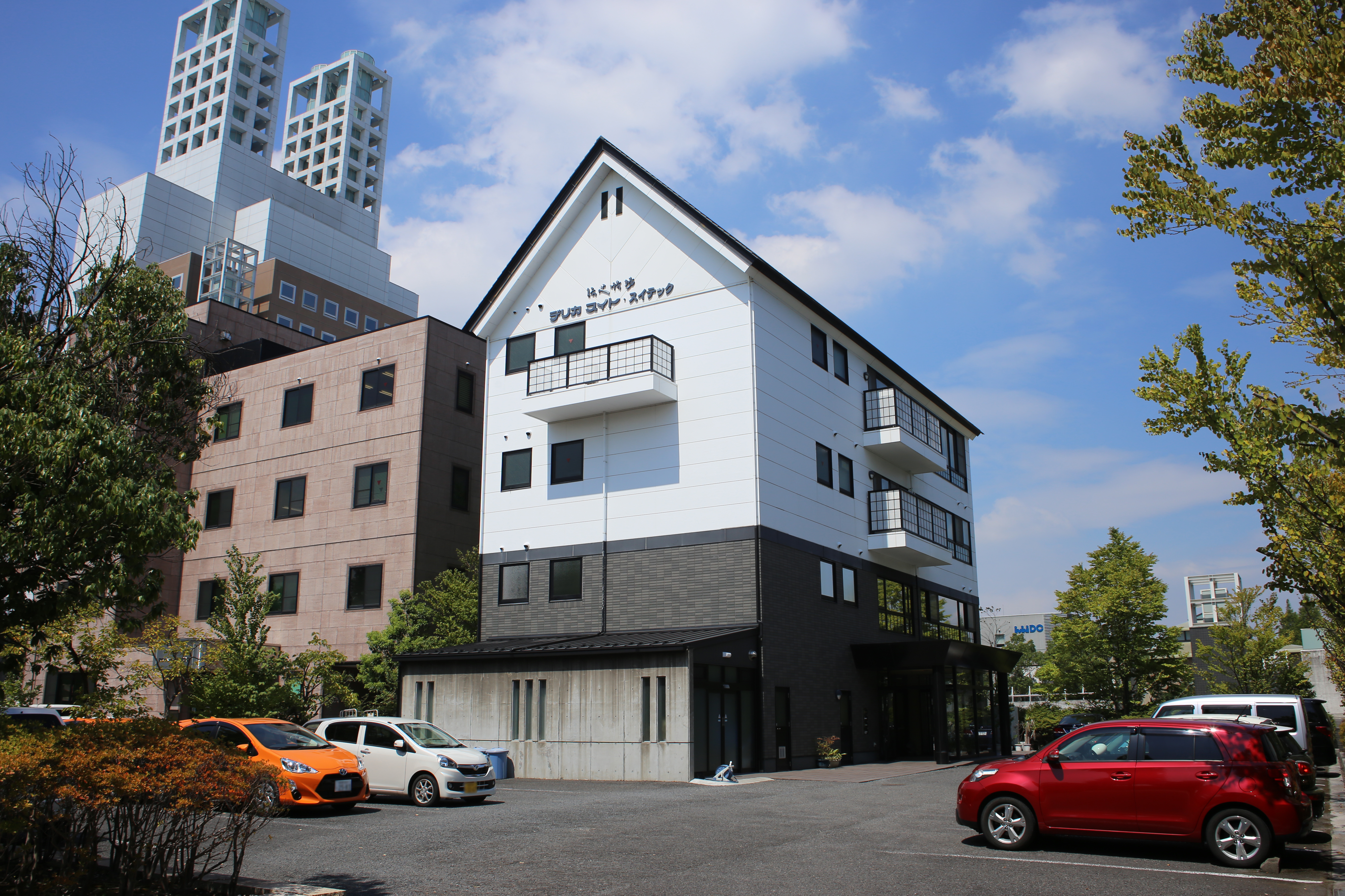 岐阜県大垣市加賀野のソフトピアジャパン内、デリカスイト本社を南側公道東側より撮影。ただし、ナンバープレートにつき画像処理済。